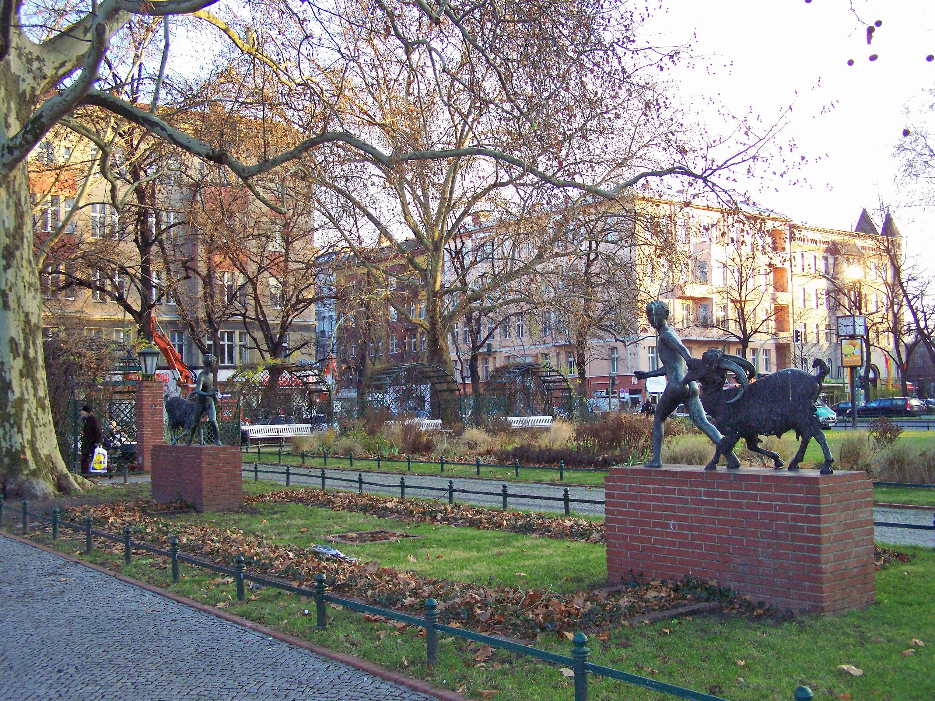 Savigny-Platz in Berlin. Knabe mit Ziege von August Kraus